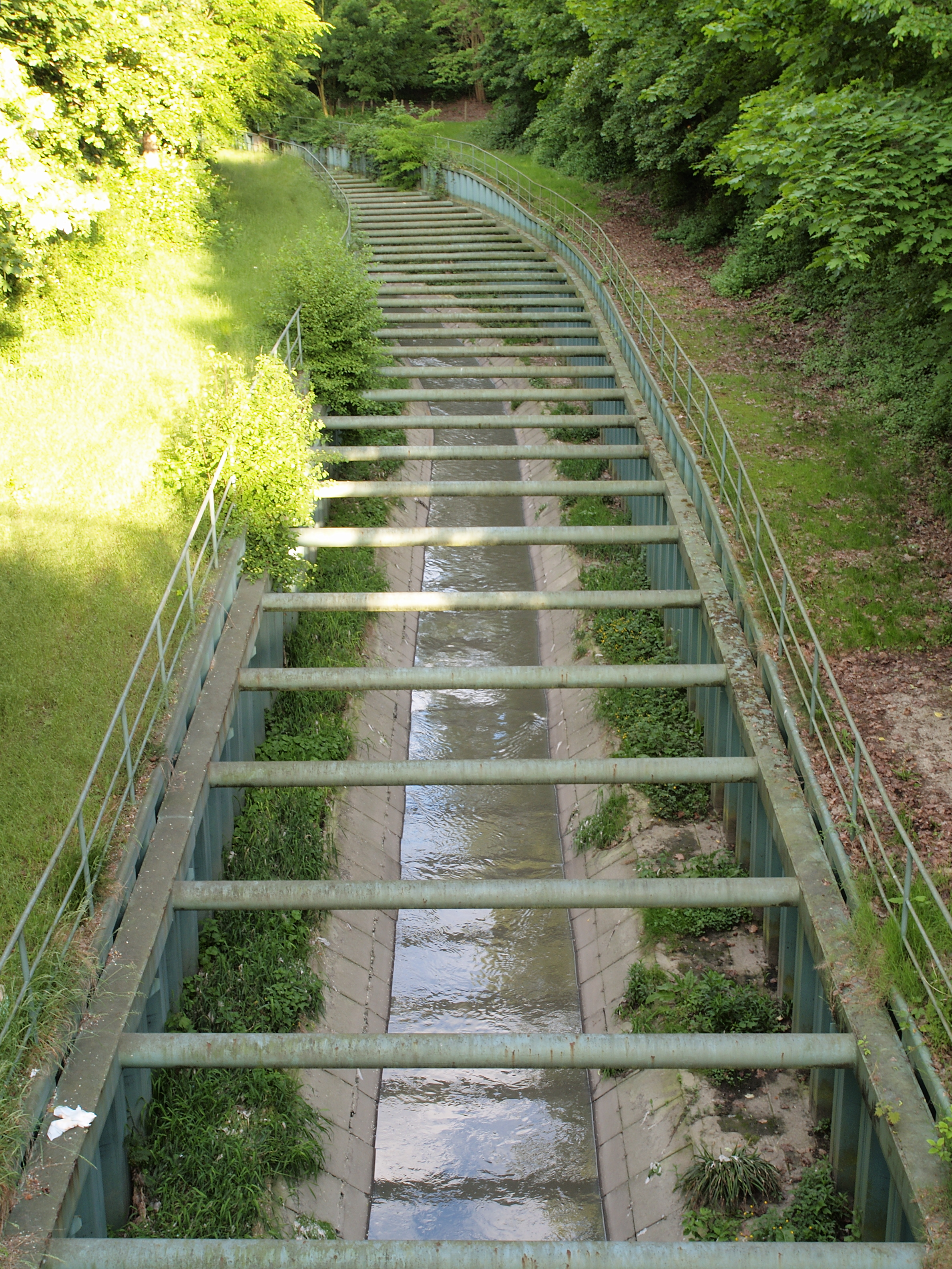 Der Landwehrbach in Herne, im Geländeeinschnitt technisch ausgebaut.